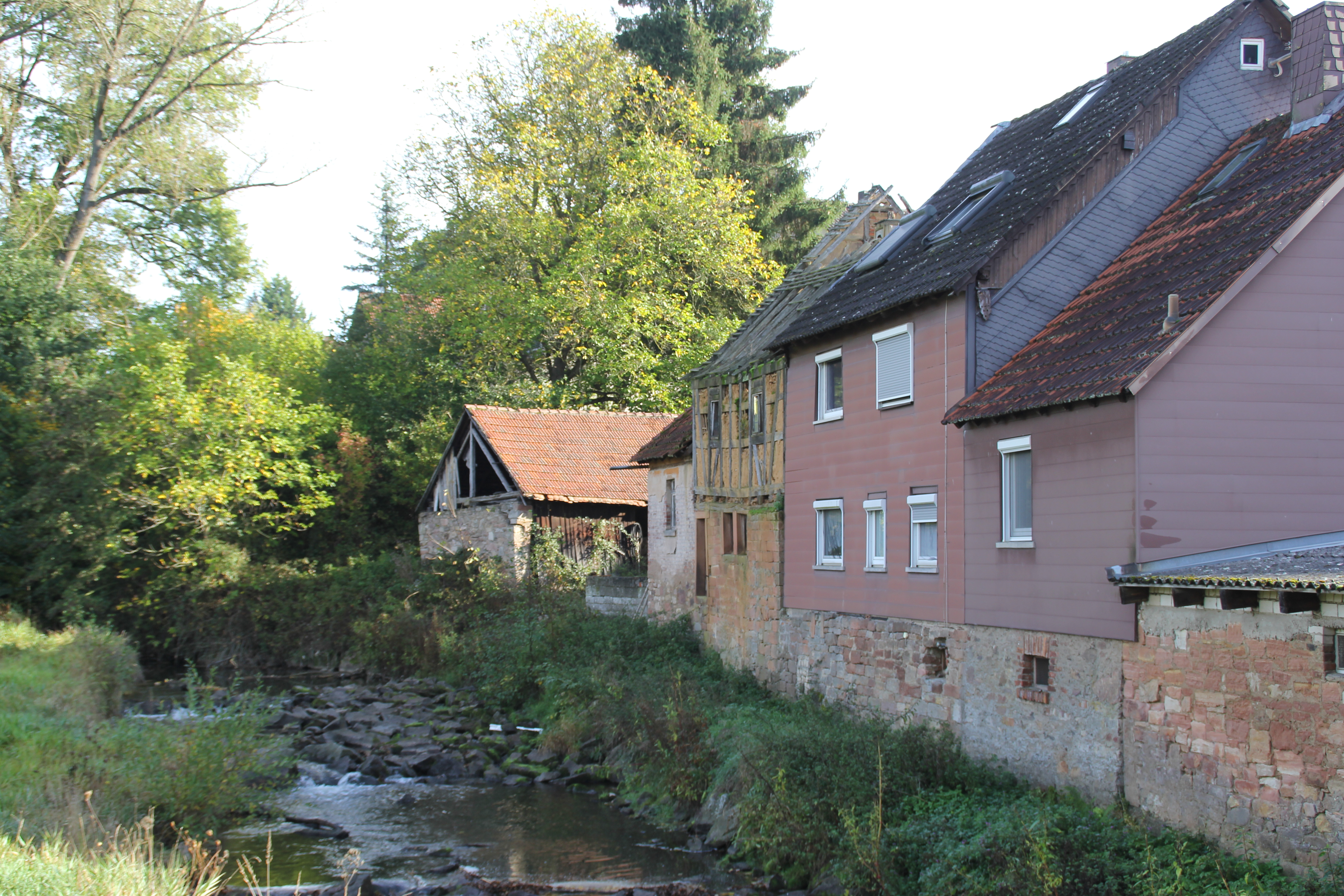 Gebäude der ehem. Blankenbacher Mühle